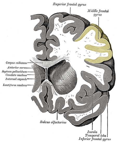 Middle frontal gyrus.